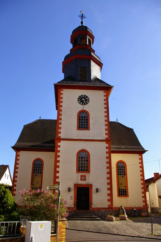 Evangelische Kirche Rupppertsburg, Laubach, Landkreis Gießen, Hessen, Deutschland